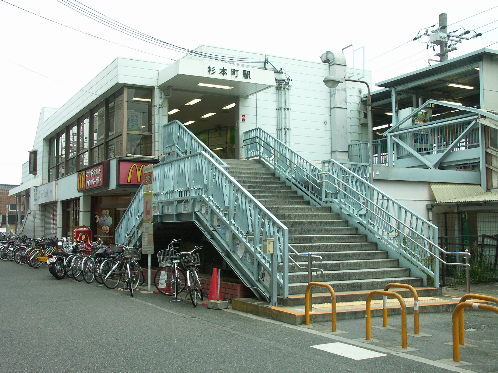 JR-West Sugimotocho Station, Hanwa-Line, Osaka (JR西日本 阪和線 杉本町駅 外観）